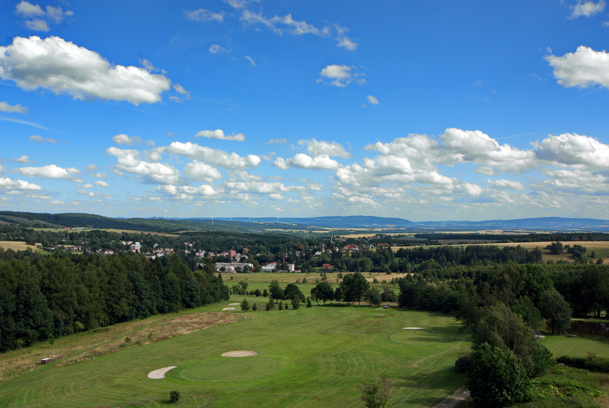 Přírodní park Kamenné vrchy, pohled na Luby z rozhledny u Strejců, okres Cheb